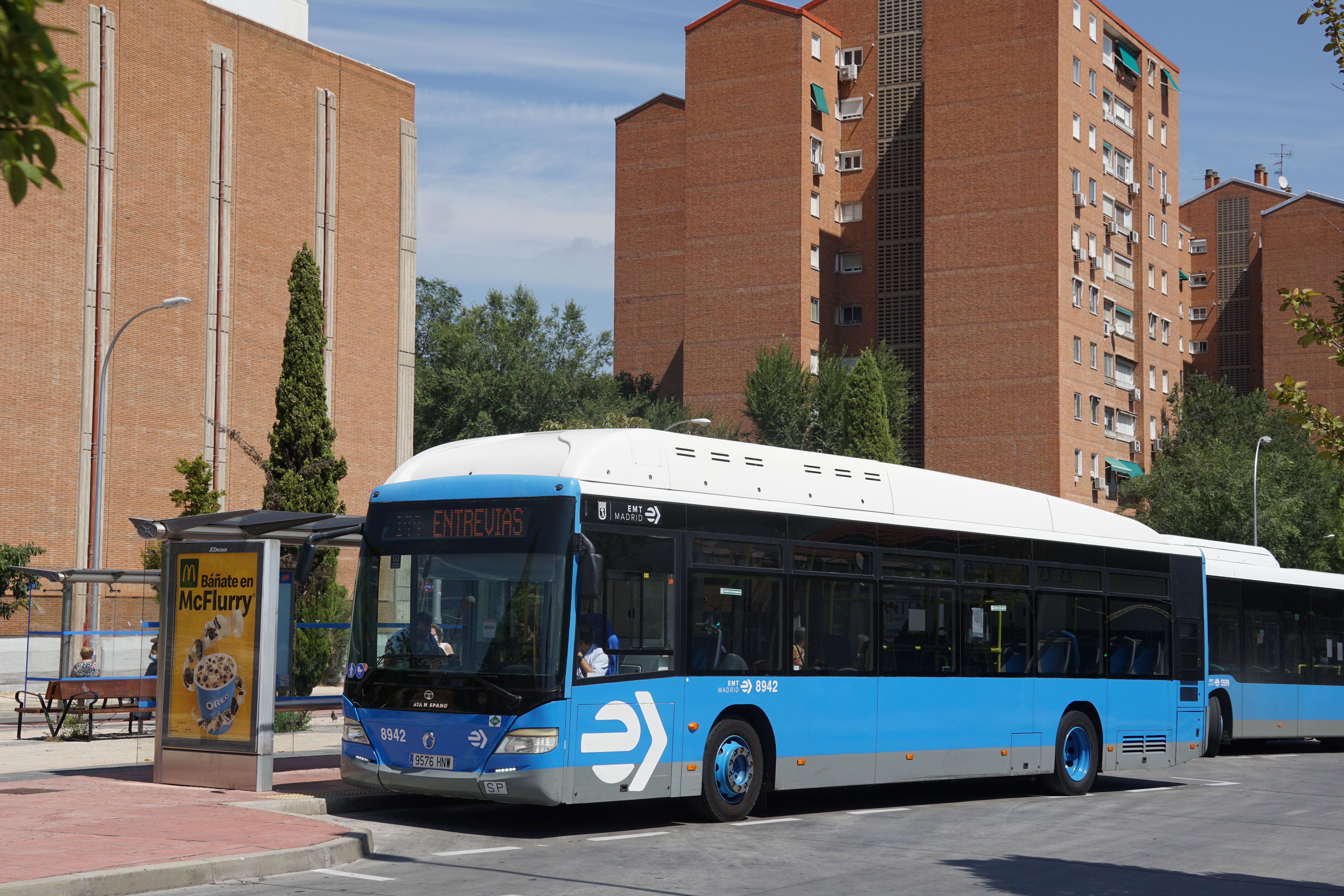 144 EMT Madrid en el final de Pavones